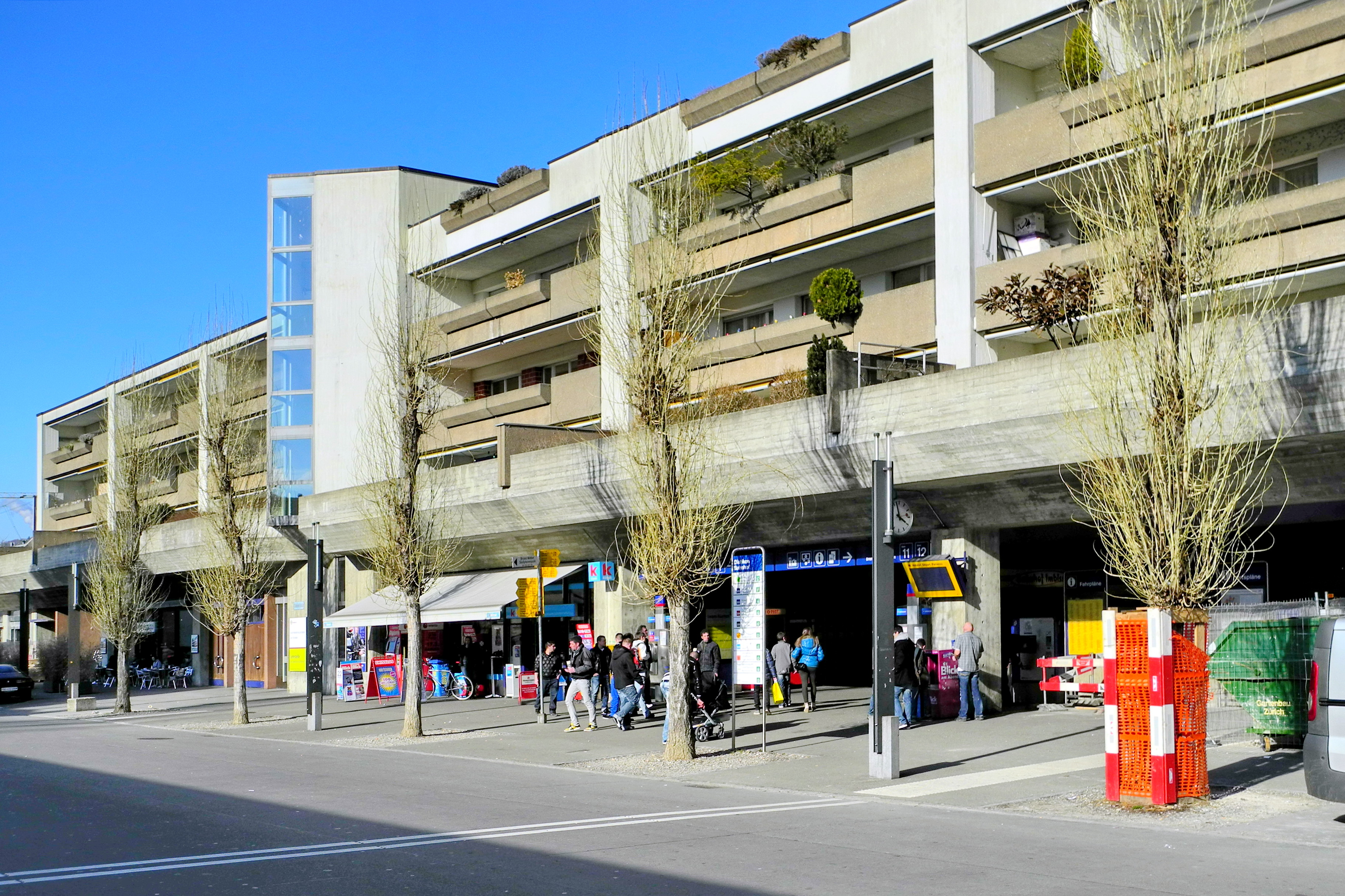 Bahnhof in Dietikon (Switzerland)